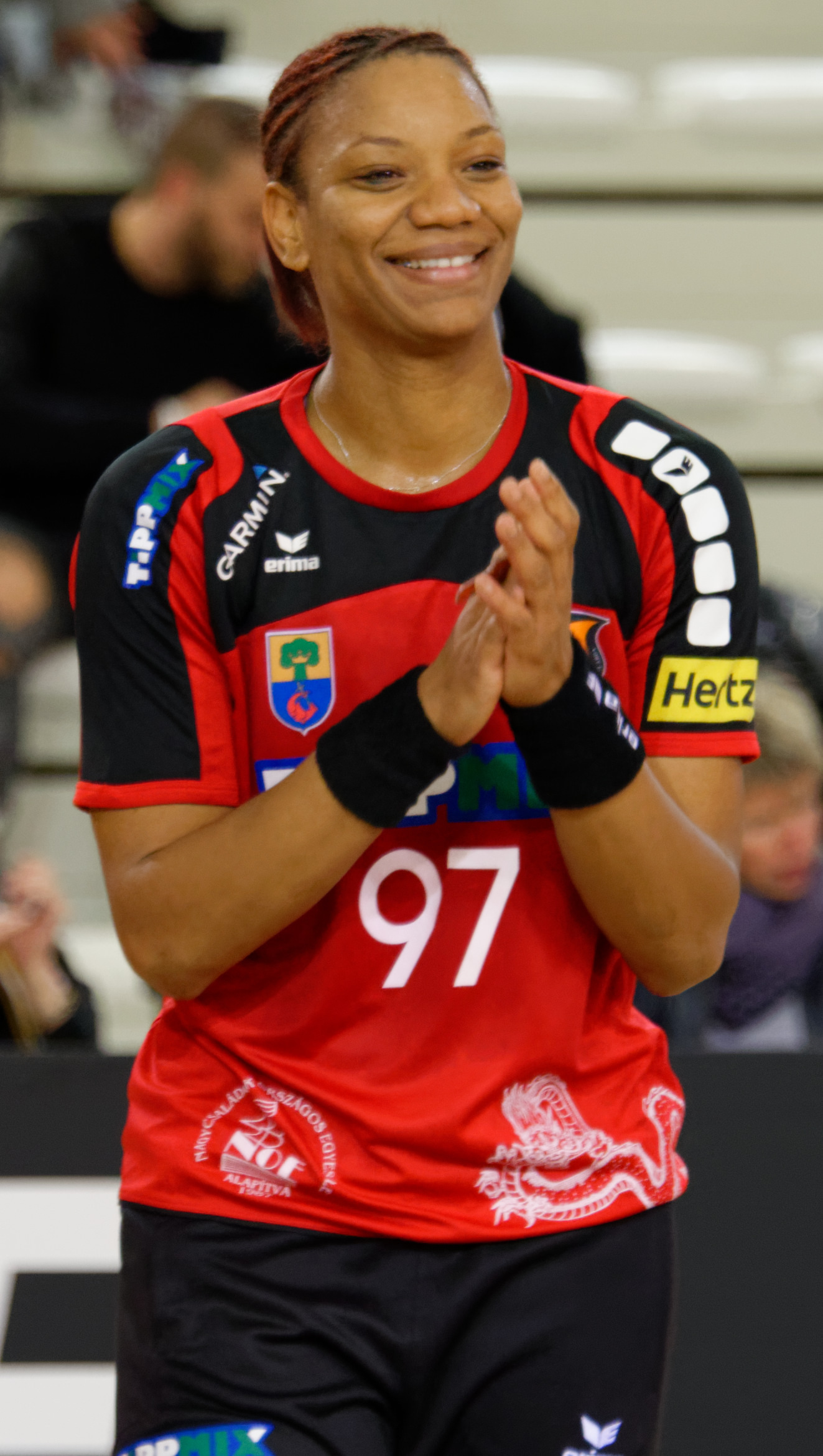 Rencontre retour du 3e tour de la coupe EHF, Issy Paris Hand / Erd. A Issy Les Moulineaux, le 18 novembre 2017.